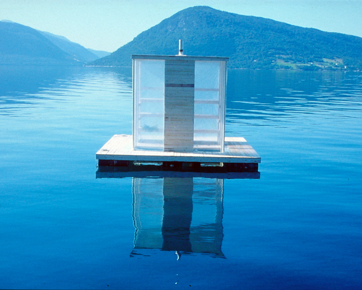 Floating Sauna by Casagrande & Rintala in Rosendahl, Norway.